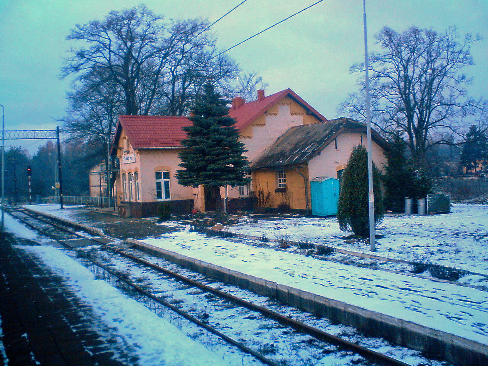 Przystanek kolejowy w Turowie Pomorskim.